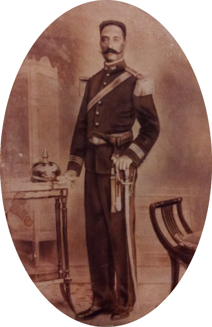 Foto del General Rafael Eguía Lis Salot vestido de militar portando espada de la RM (Republica Mexicana).